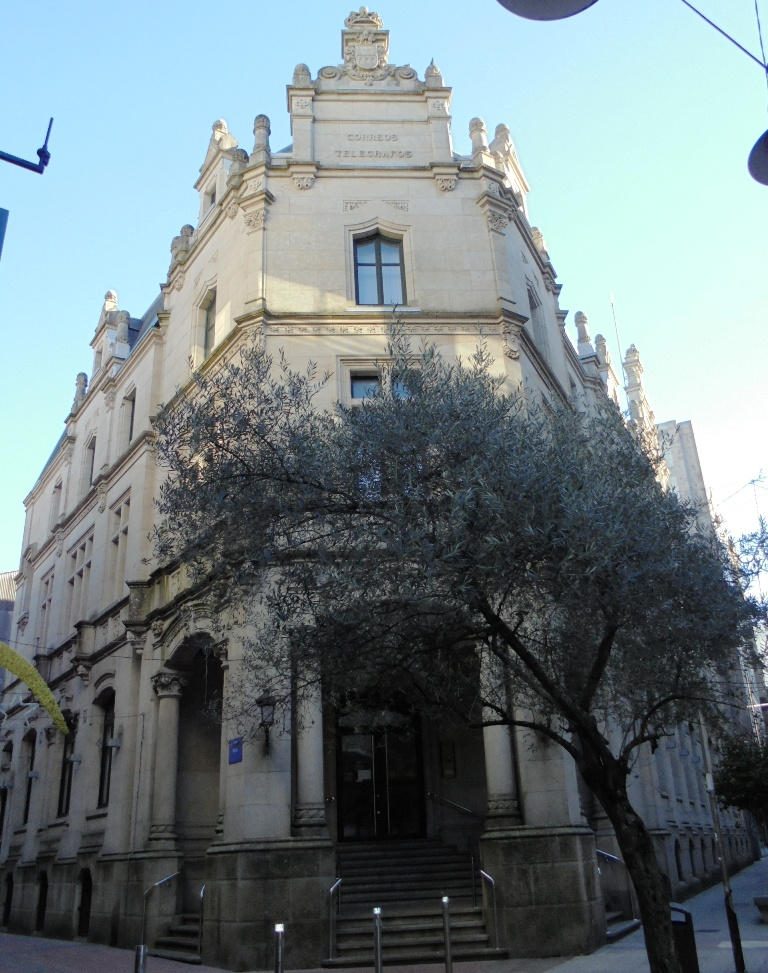 Correos entrada principal Pontevedra capital